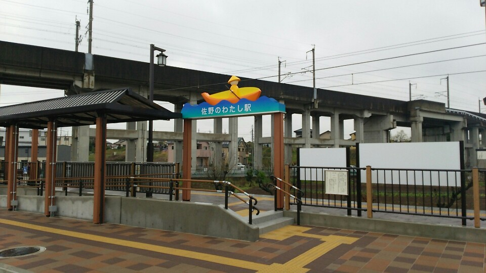 佐野のわたし駅の駅舎です。